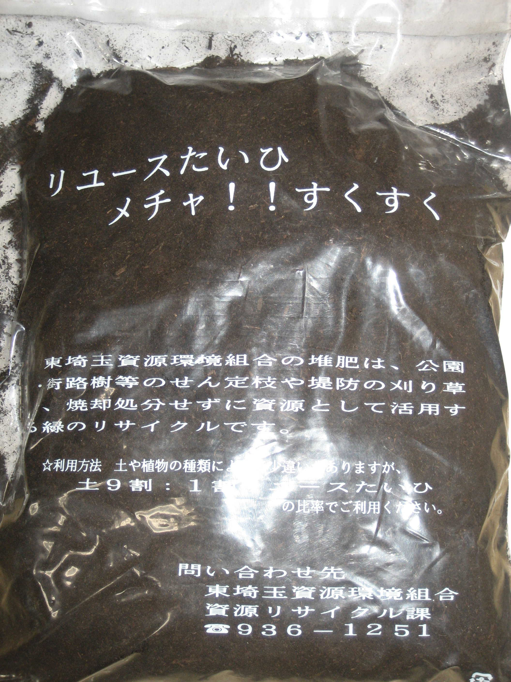 東埼玉資源環境組合堆肥袋